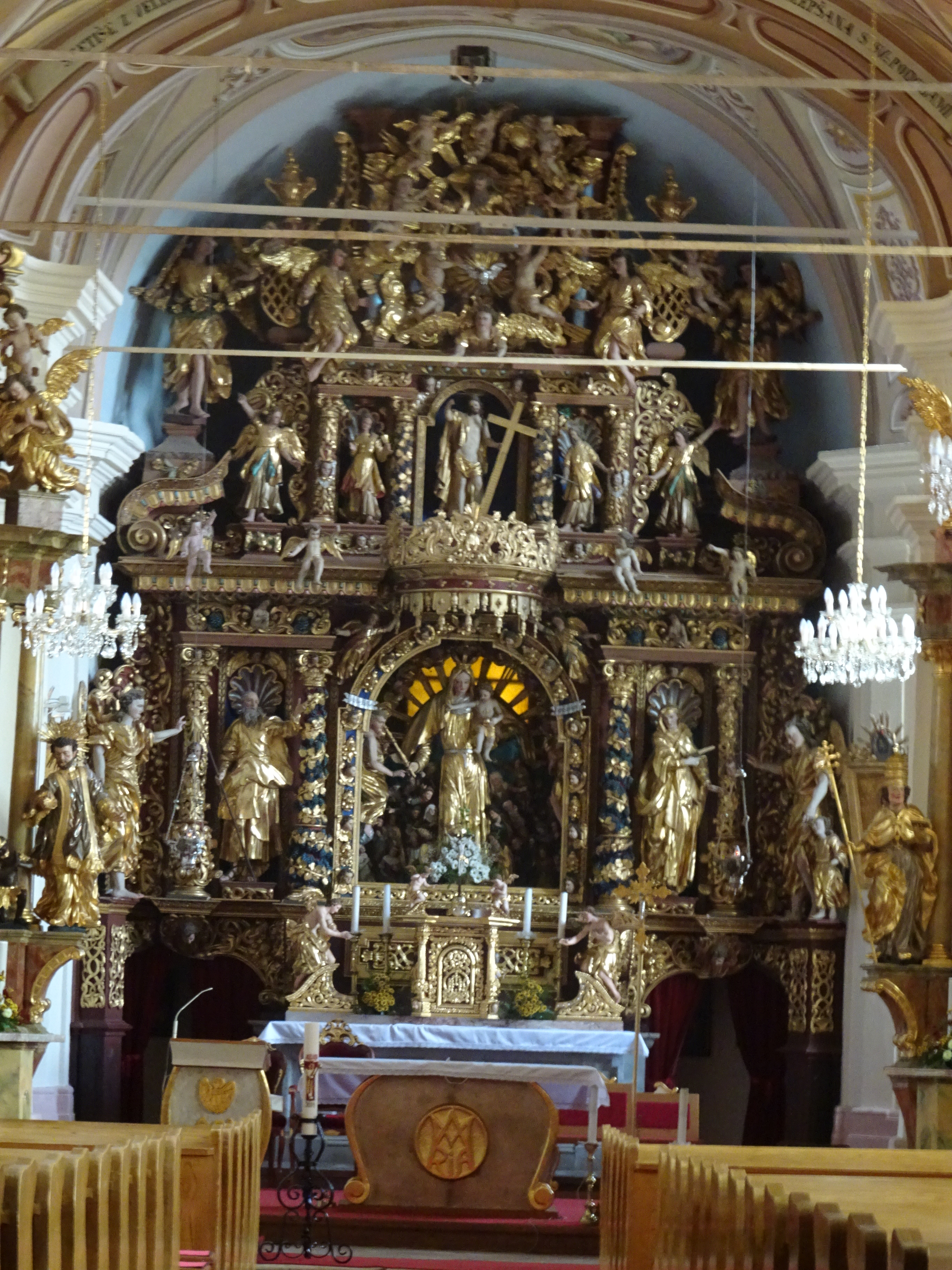 glavni oltar župnijske cerkve na Prihovi, Oplotnica